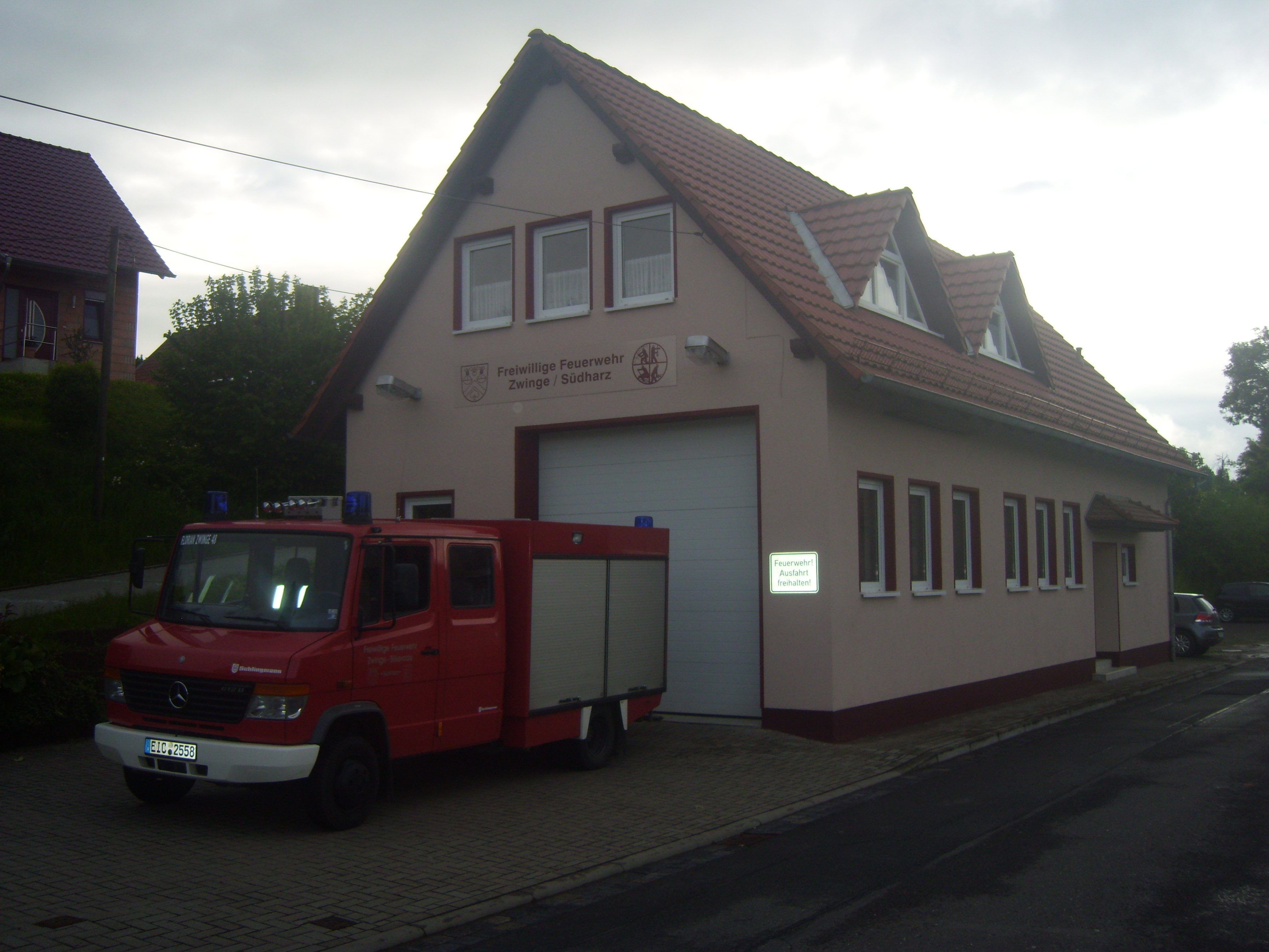 Feuerwehrhaus